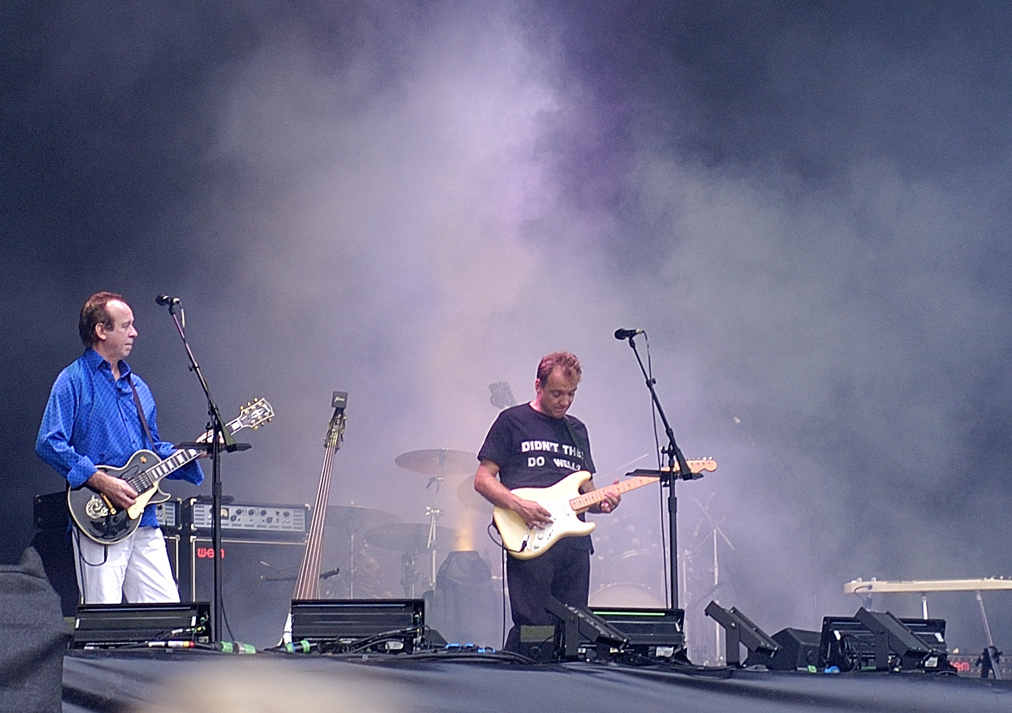 Un momento del concierto de David Gilmour en Munich, el 29/07/2006.